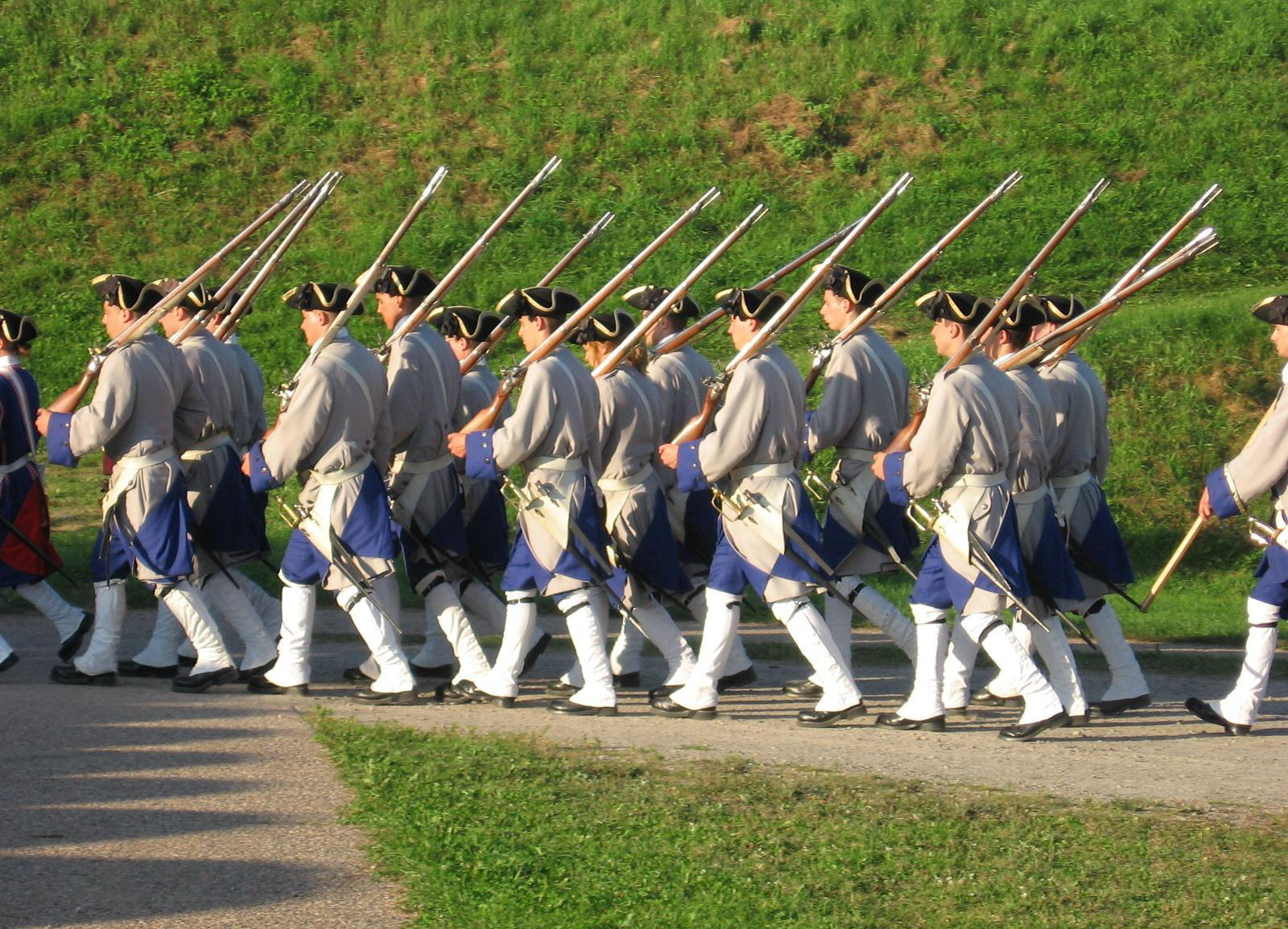 Compagnie Franche de la Marine